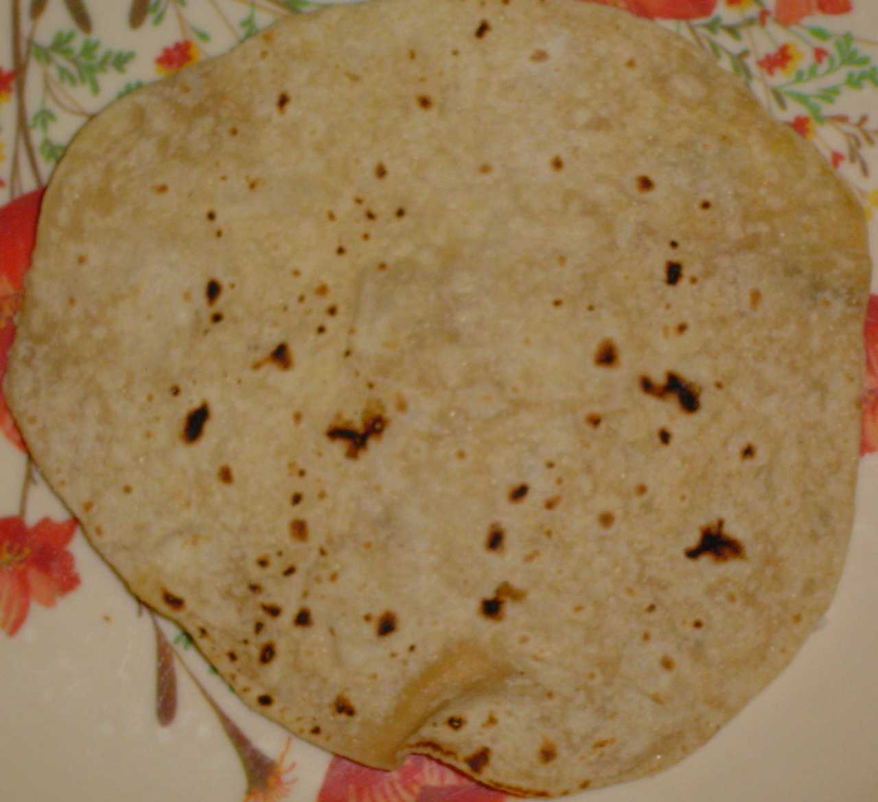 Roti